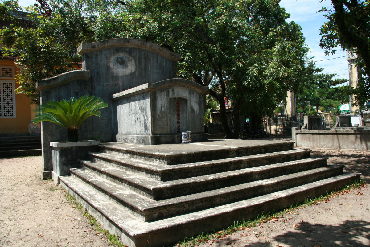 Mộ phần Phan Bội Châu